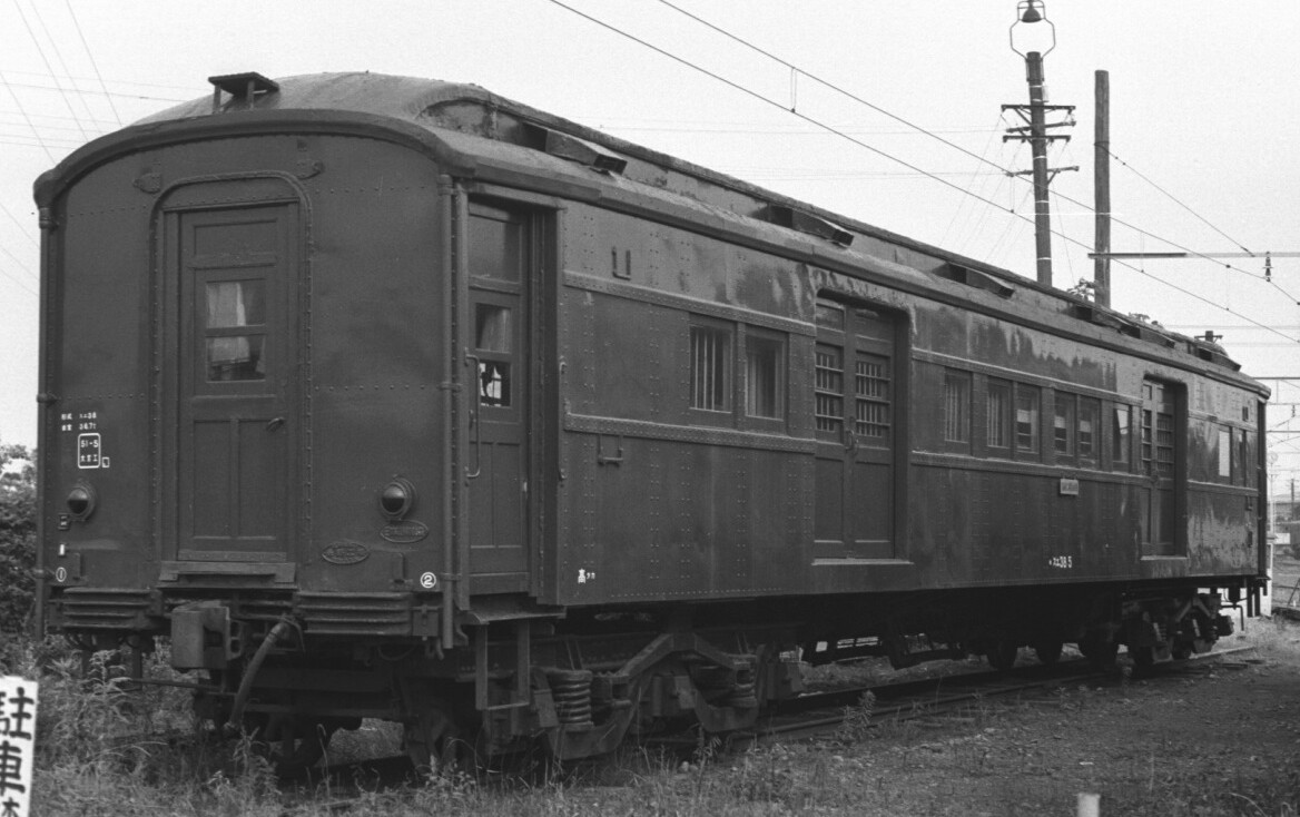 高崎第二機関区にて。許可を得て撮影。 JNR-Sue-38-5（国鉄スエ38 5, スエ38形救援車）